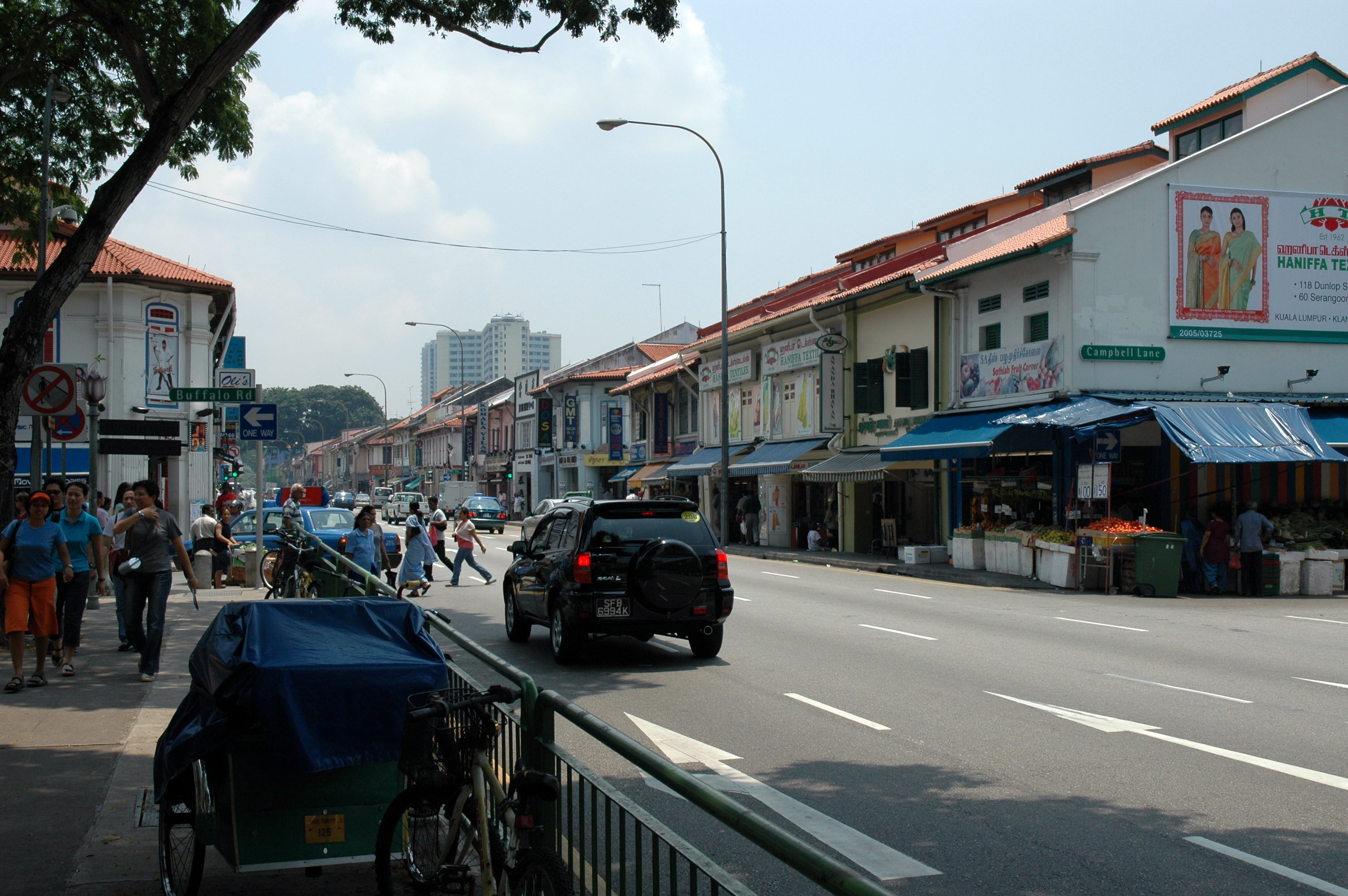 Little India in Singapore.